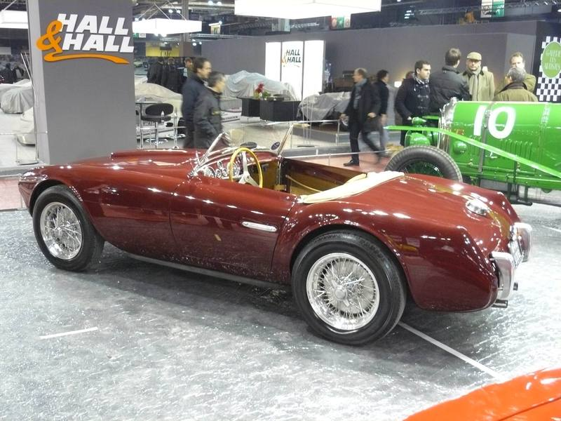 Retromobile 2012